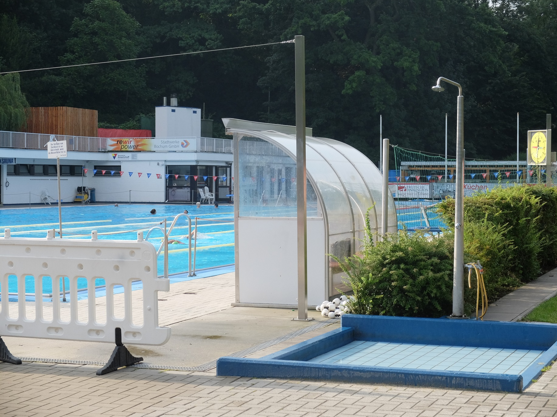 Schwimmbad des S. V. Blau-Weiß Bochum von 1896 e. V. im Wiesental